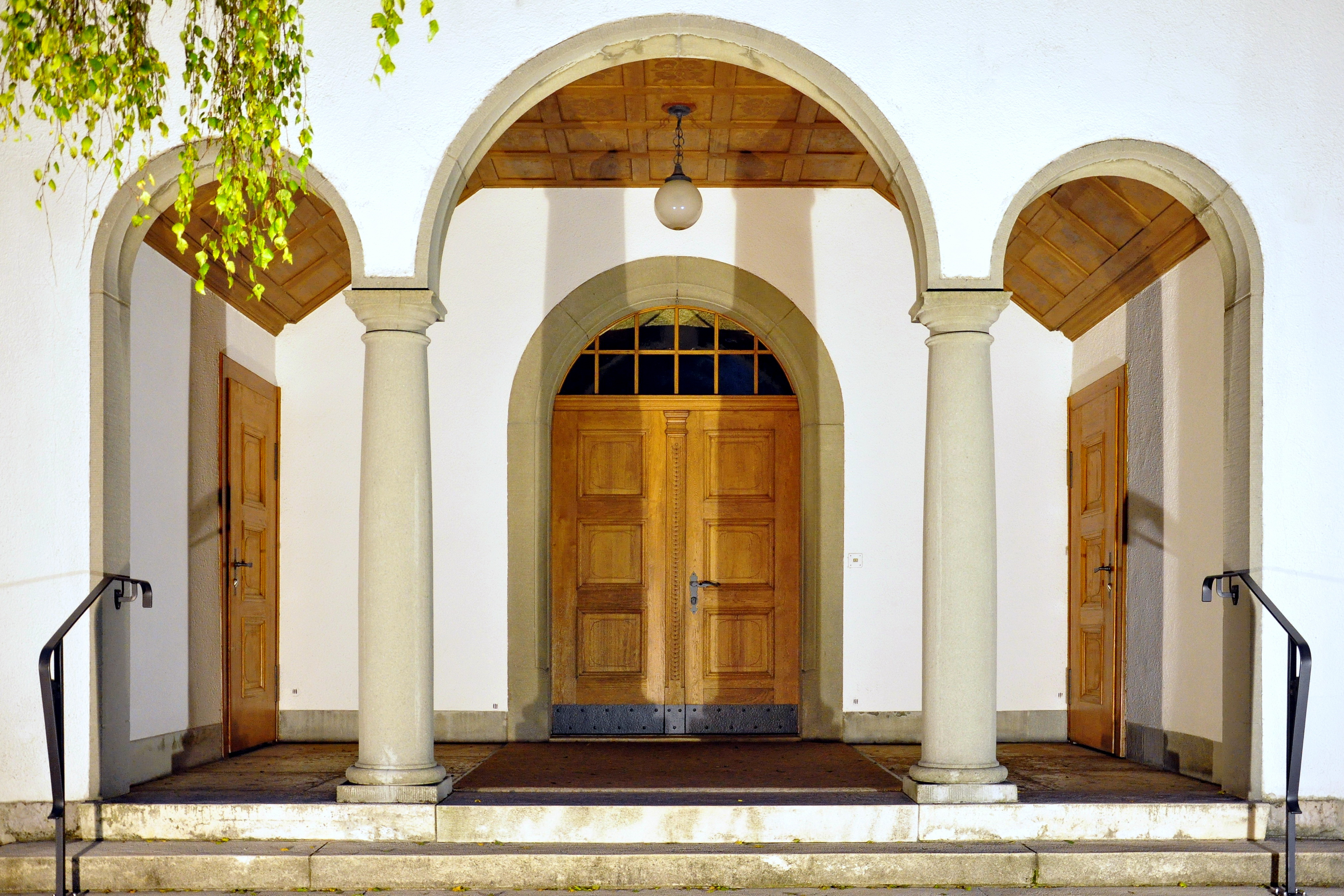 Reformierte Kirche in Zürich-Unteraffoltern (Switzerland)